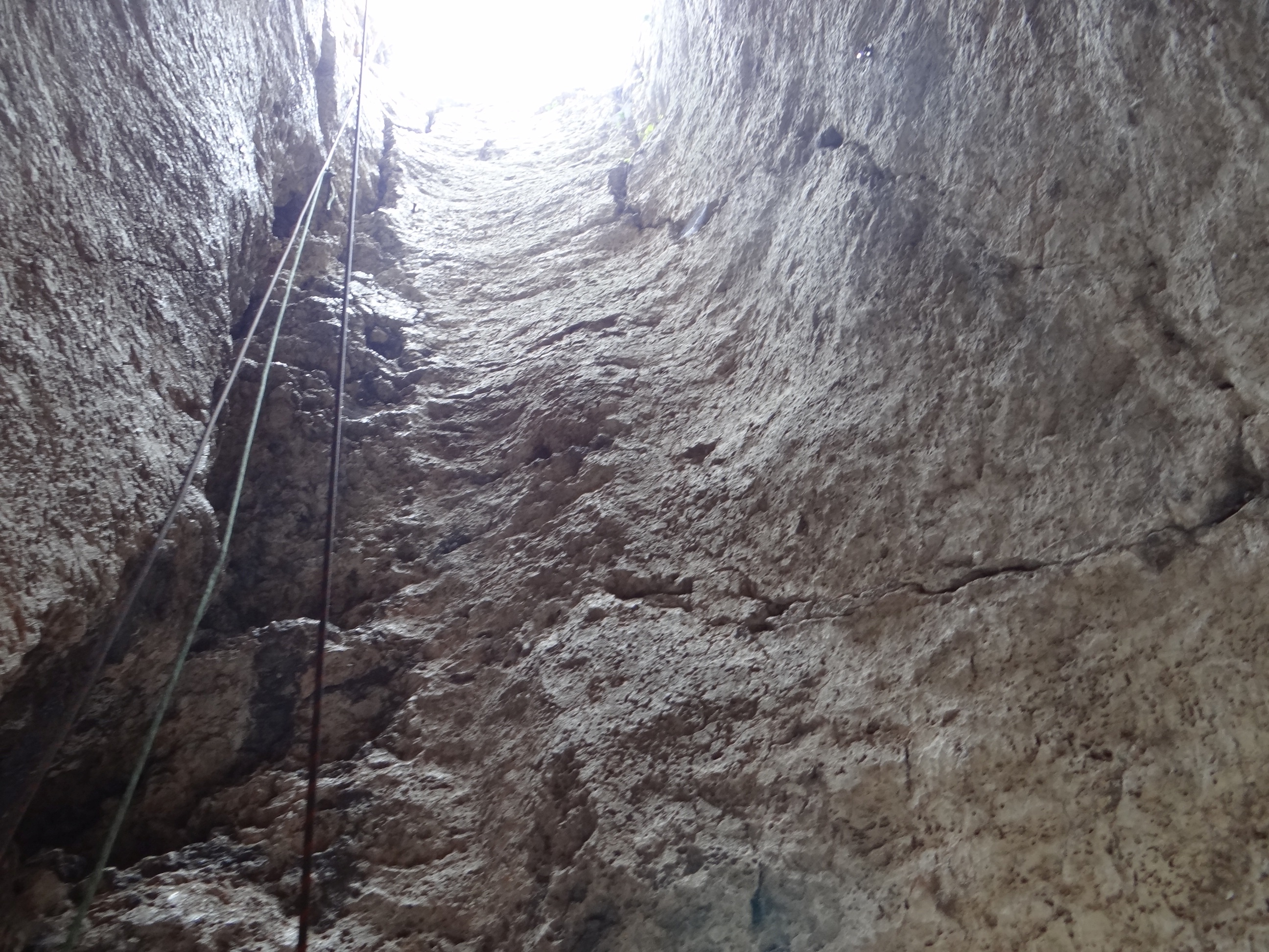 Komin w Studnisku Rzędkowickim